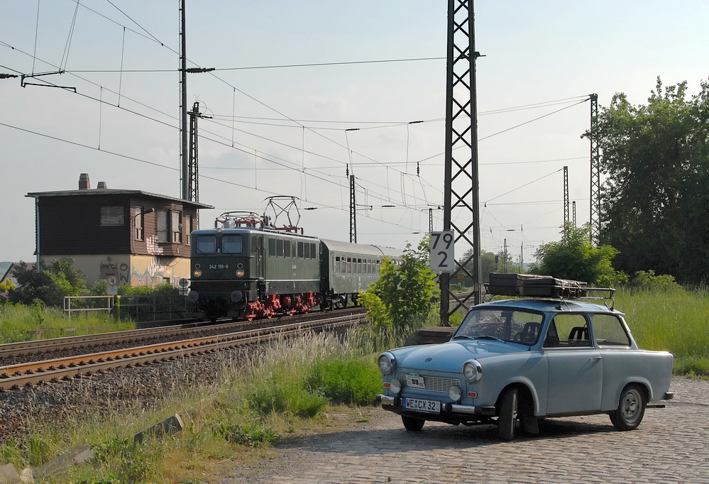 142 151 in Oßmanstedt